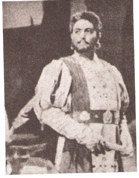 tenor italiano mario del monaco